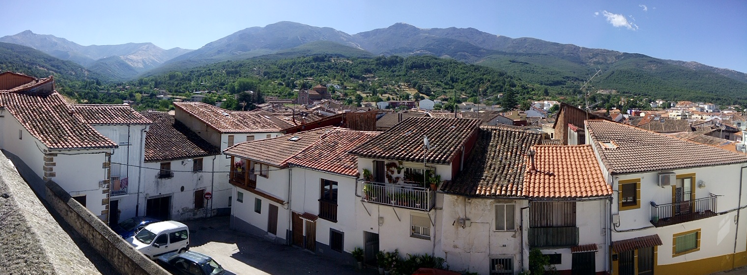 Panorámica de Hervás. Cáceres (España).